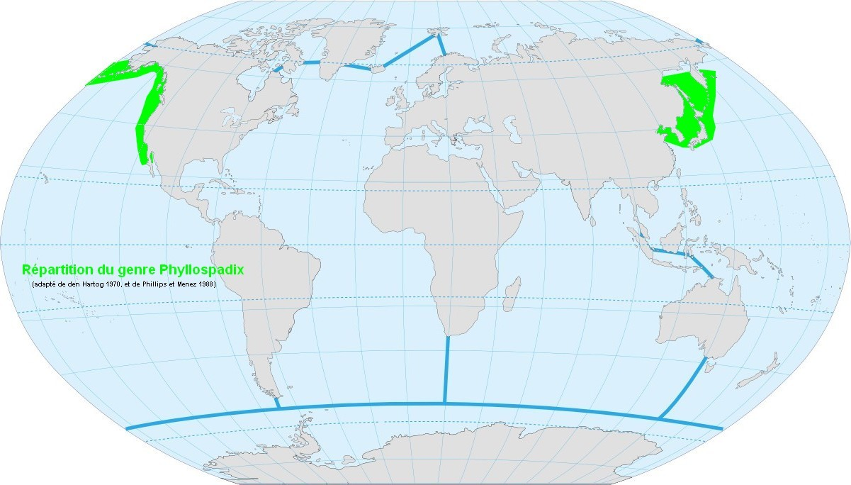 Répartition mondiale du genre Phyllospadix (adapté de den Hartog 1970, et de Phillips et Menez 1988